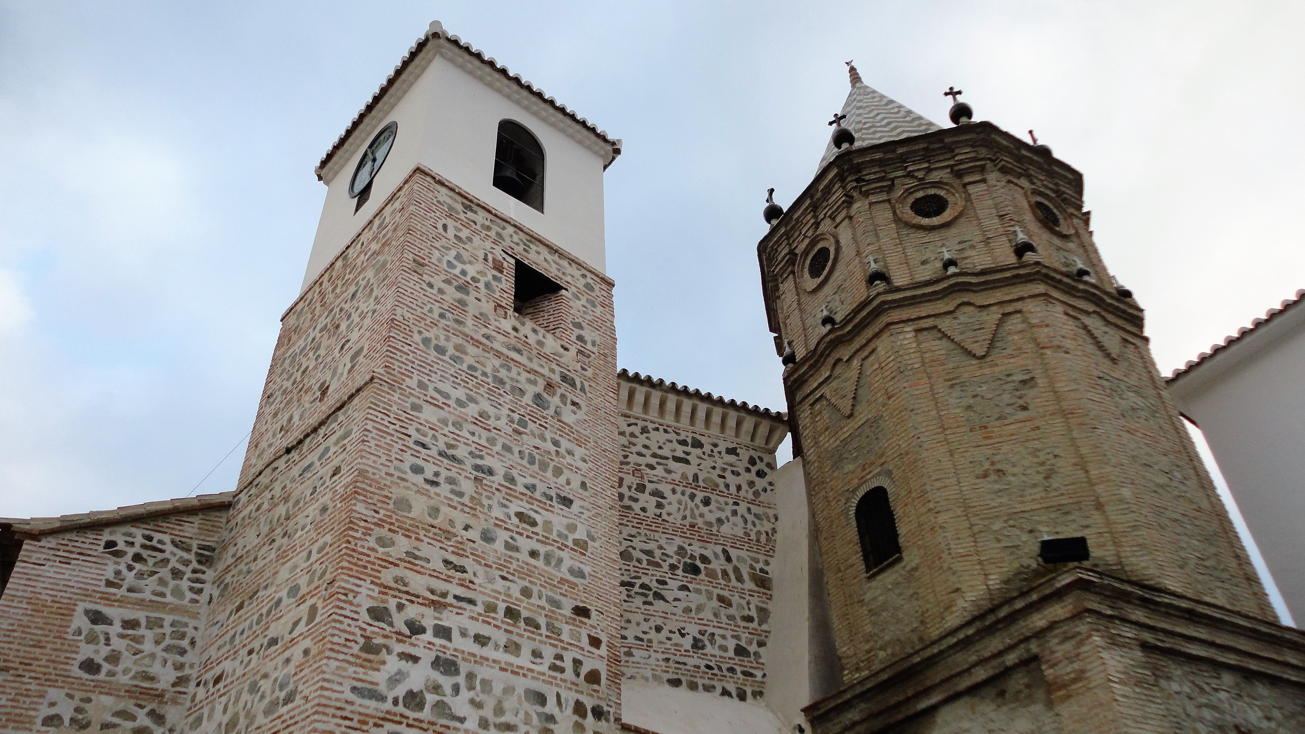 Iglesia Ntra. Sra. del Rosario de El Borge